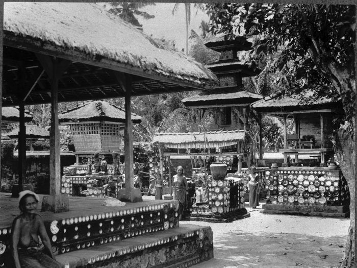 Foto. Op het binnenterrein van het tempelcomplex Poera Satria, Bali